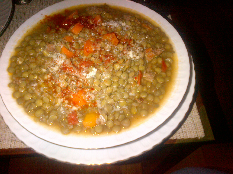 Lentejas con carne molida, encima tiene pimenton rojo y queso parmesano en polvo.